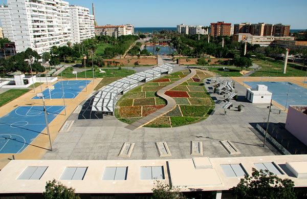 Parque del Oeste en Málaga